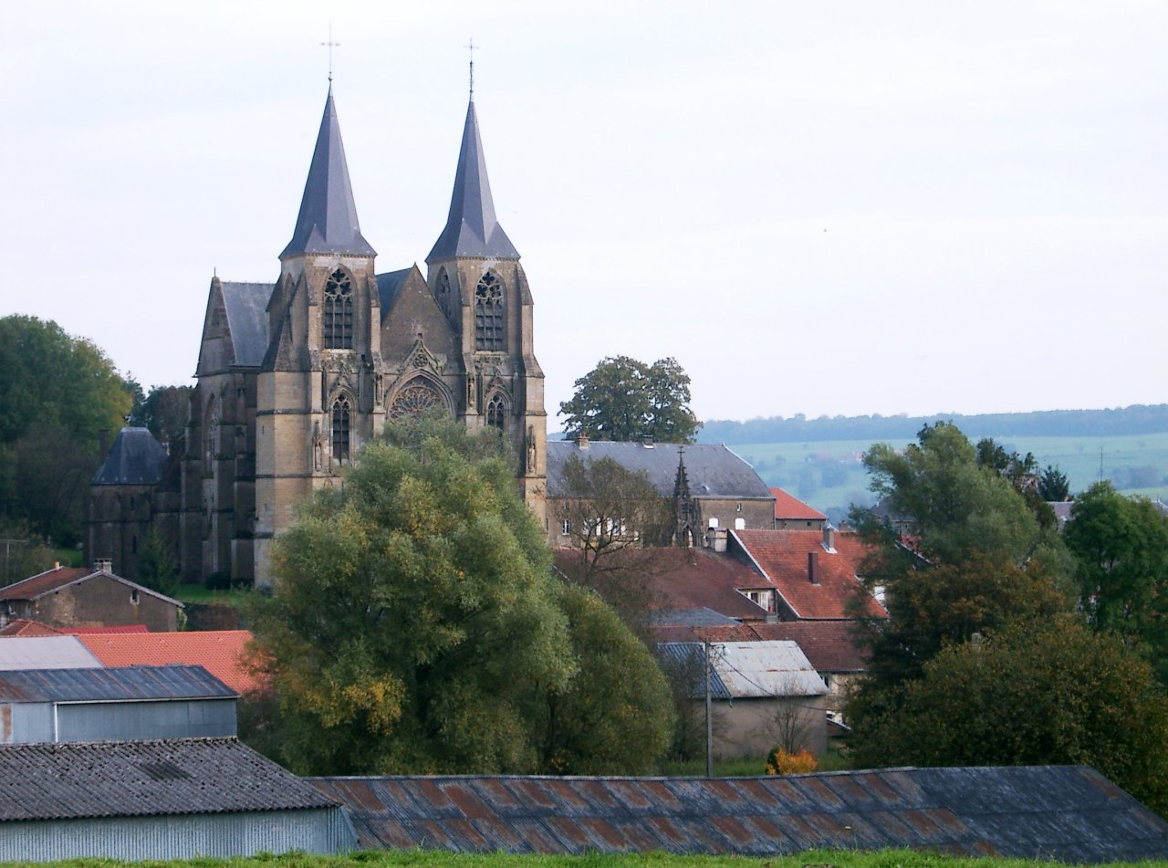 Basilika vun Avioth.